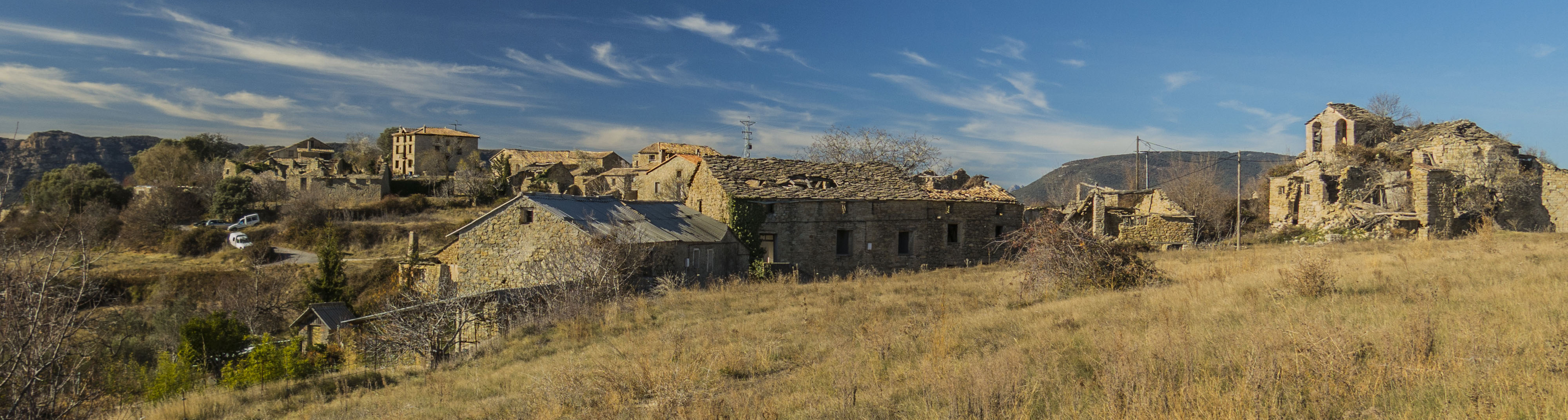 Poble del municipi d'Isàvena, a la Baixa Ribagorça d'Osca.